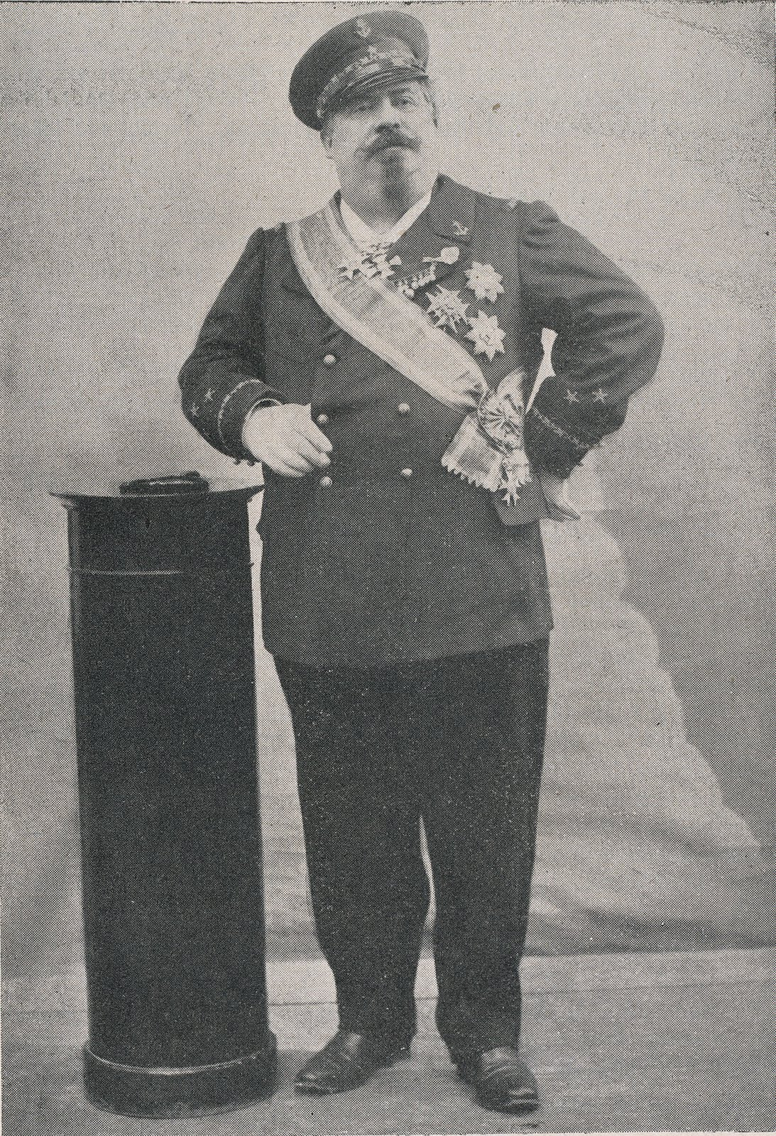 Gustave Achille La Viarde fue un gobernante del Reino de la Araucanía y la Patagonia, un reino que intentó establecerse en territorios que hoy pertenecen a Argentina y Chile y que no fue reconocido por estado alguno. Nació en Reims, 201, calle de Barbâtre, el 7 de noviembre de 1841 y falleció en París 12, 2, avenida del Trône, el 16 de marzo de 1902.